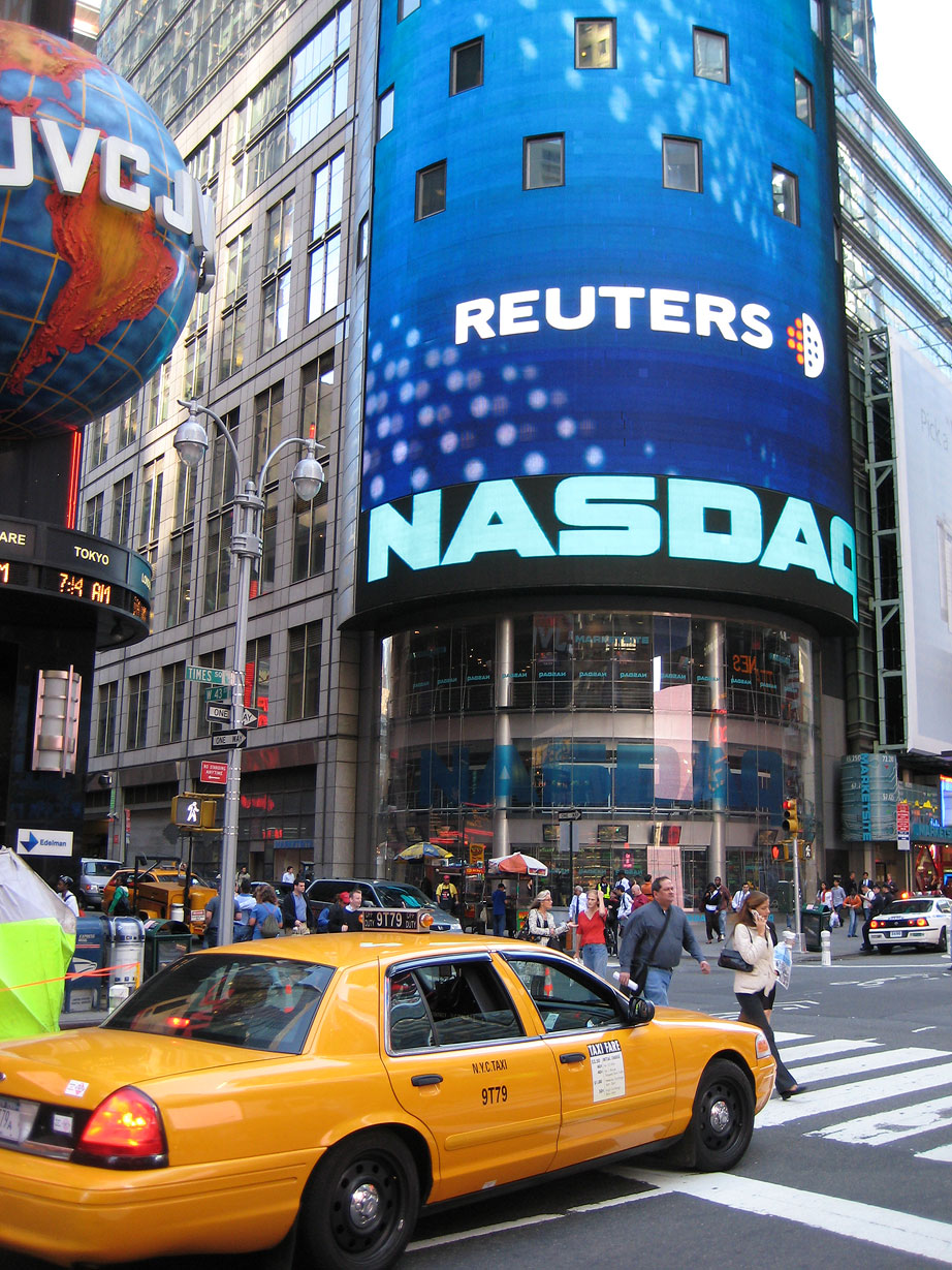 NASDAQ